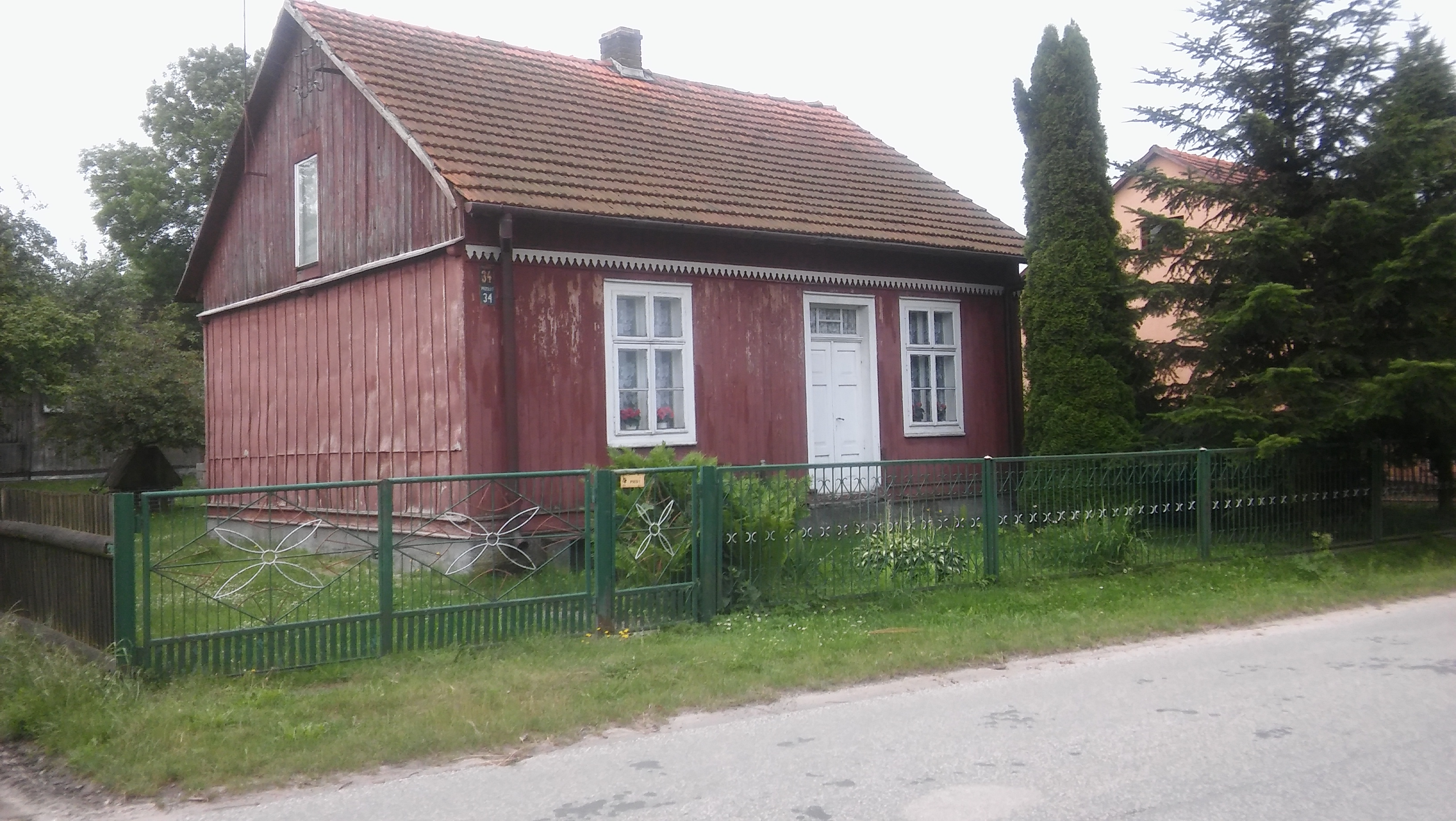 Przełaj - tradycyjne zabudowania wiejskie